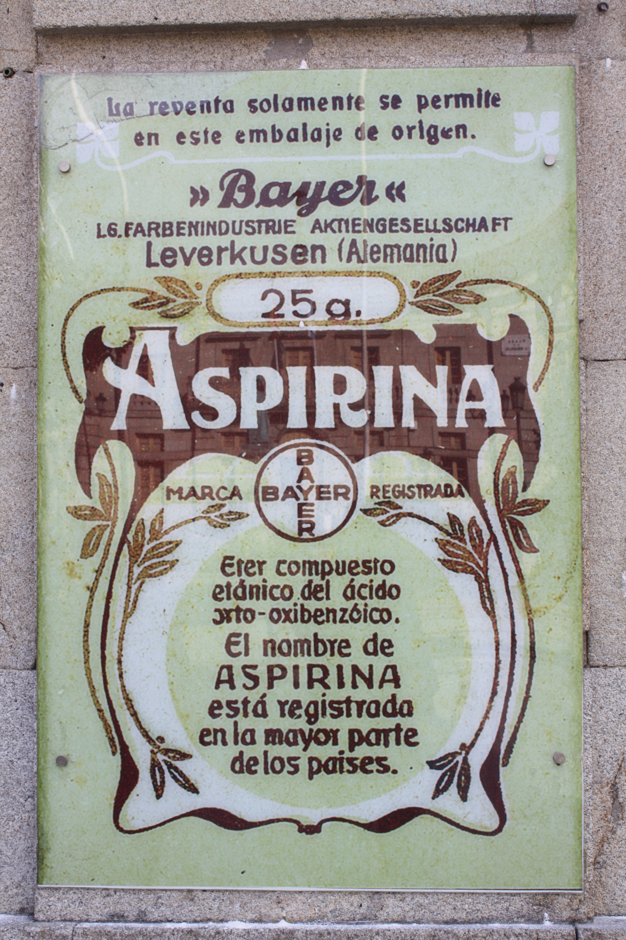 Vello anuncio de Aspirina, nunha farmacia de Tui